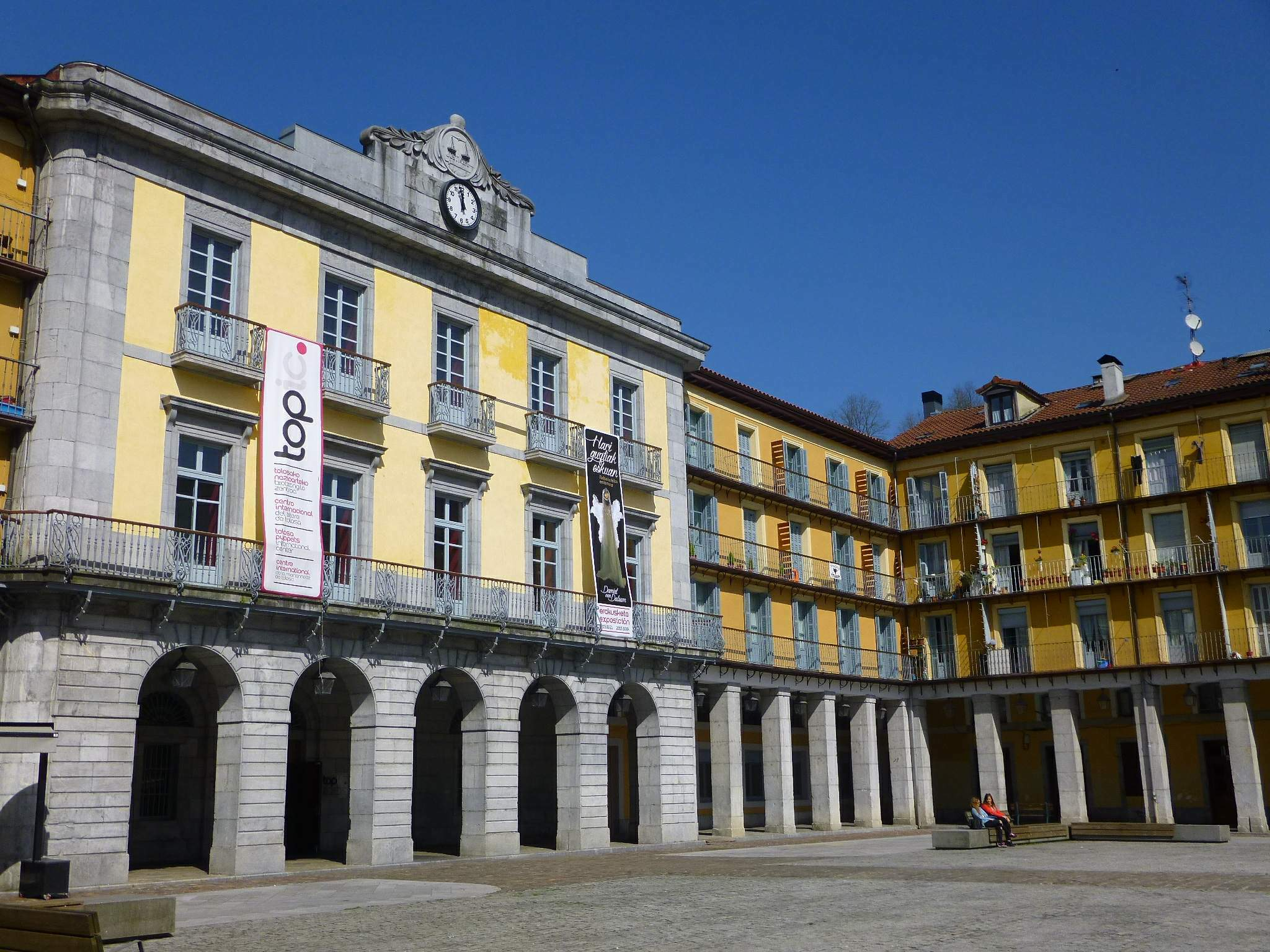 Plaza Euskal Herria (Tolosa)